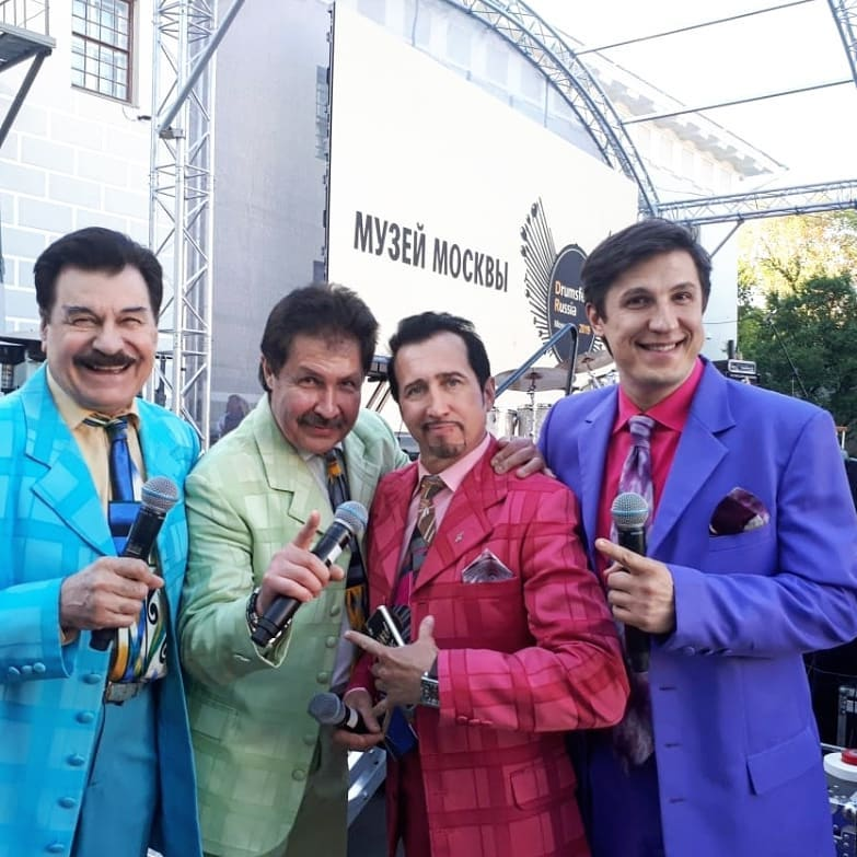 группа "Доктор Ватсон"